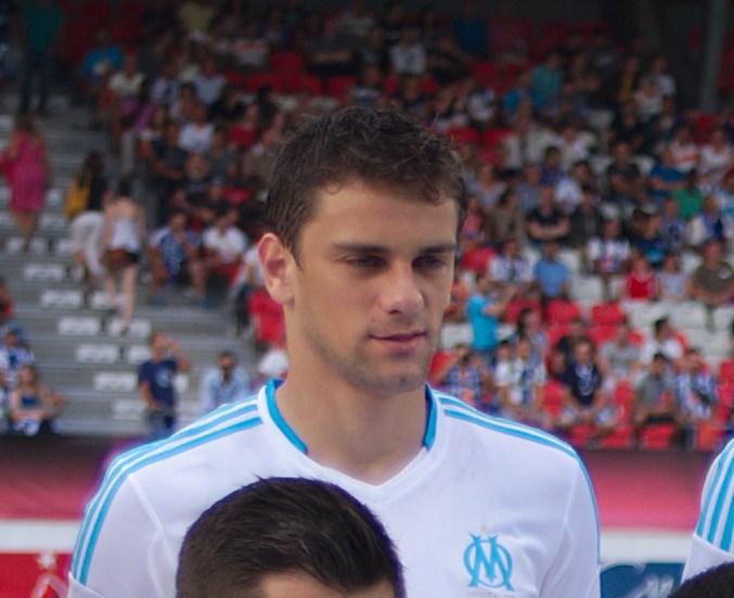 Lucas Mendes